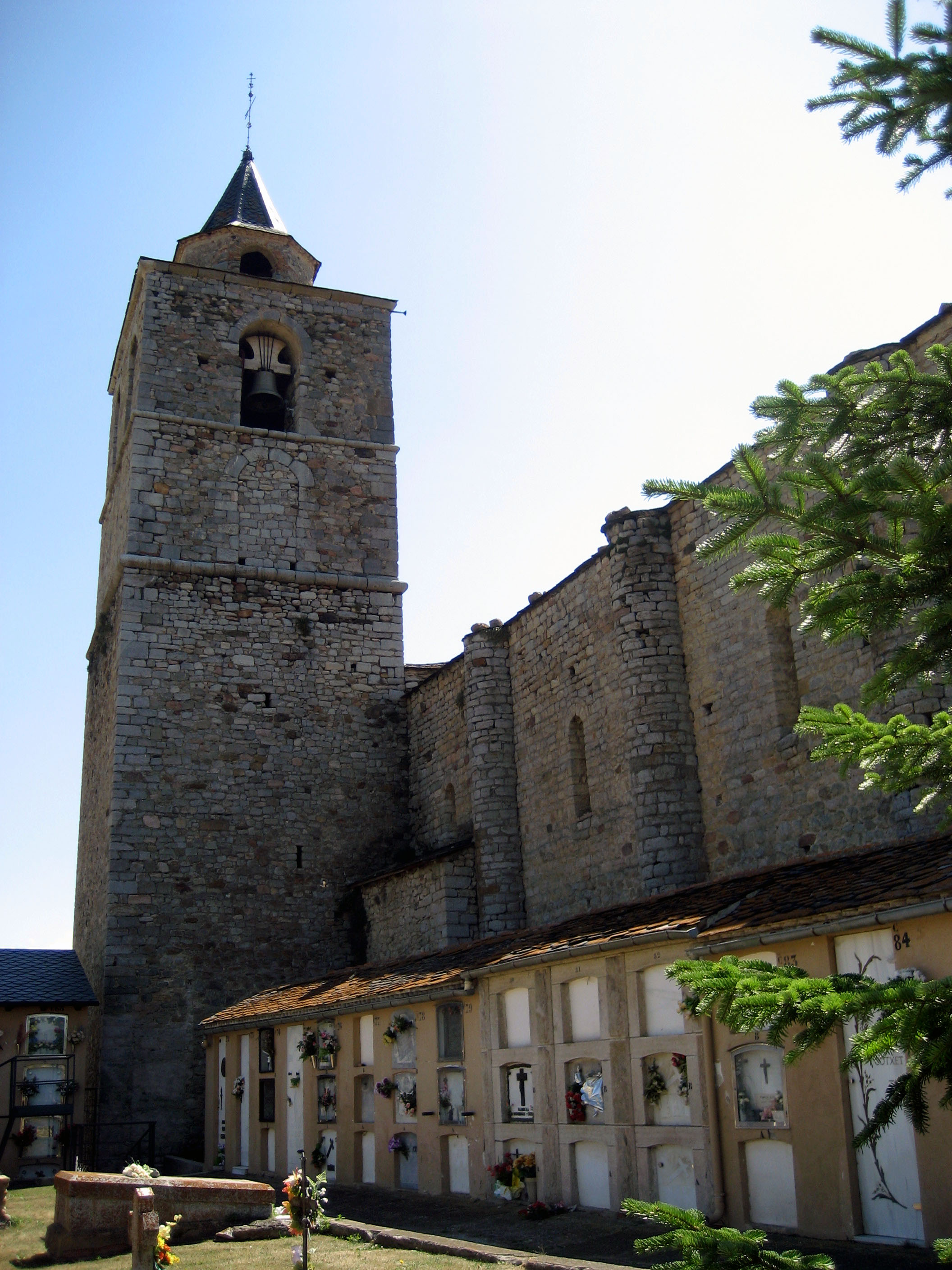 Façana lateral (amb cementiri) de Santa Maria de Talló. Baixa Cerdanya. Catalunya